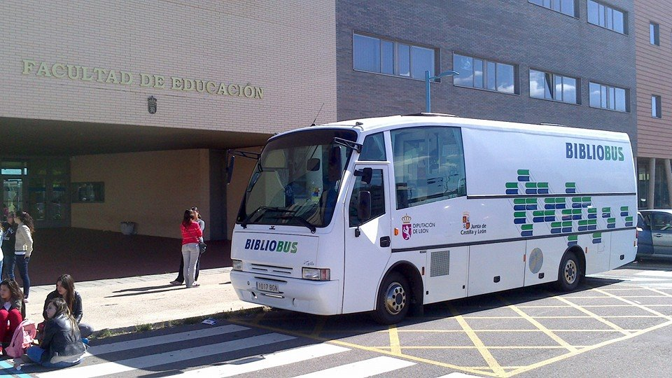 Bibliobús ante las puertas de la Facultad de Educación de la Universidad de León, para su conocimiento in situ de los futuros maestros, ahora estudiantes.